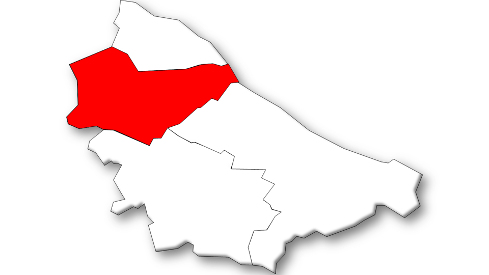 Evolução da População